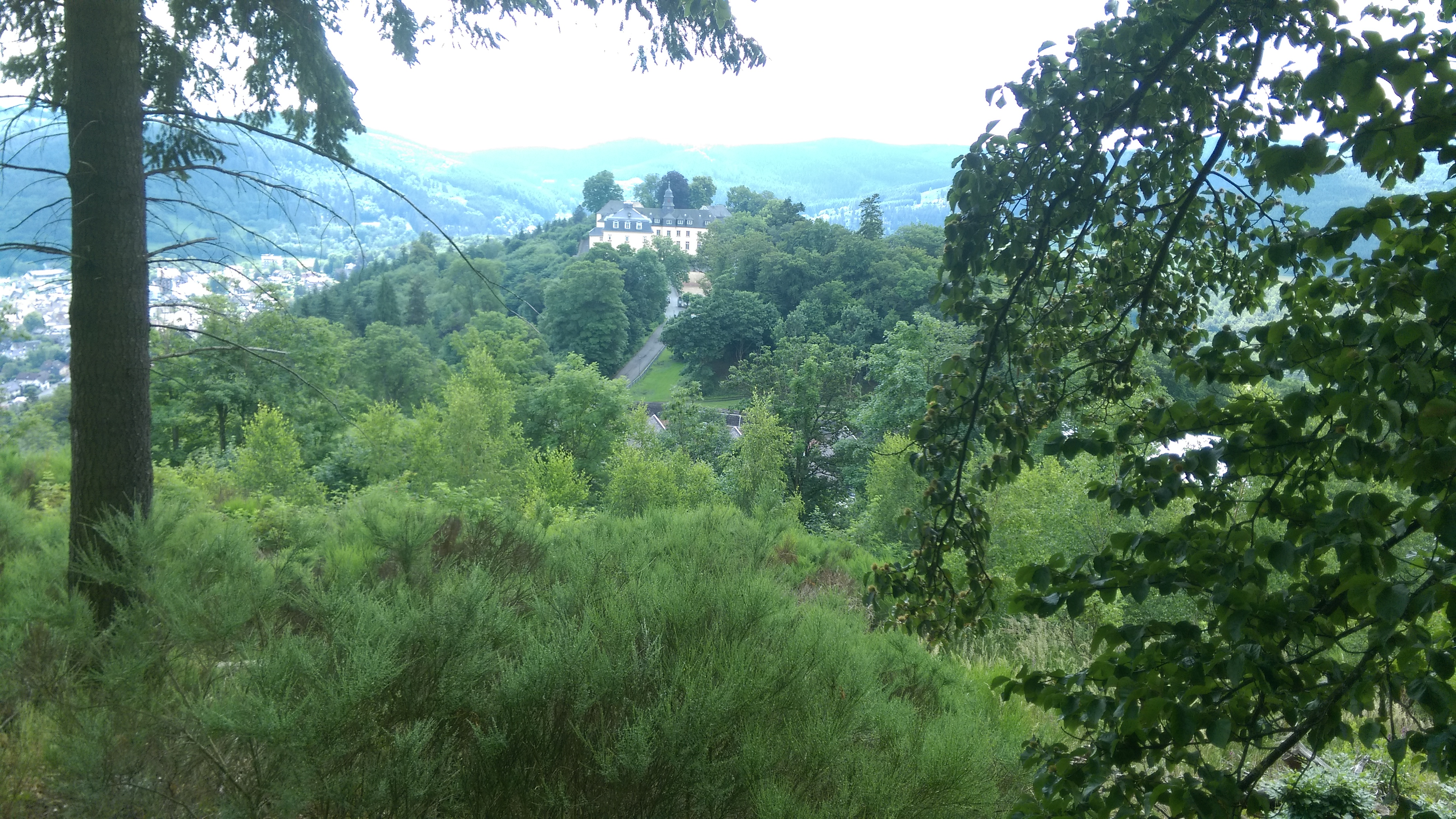 Schloss Wittgenstein, Aufnahme von der Alten Burg, dem Standort des Denkmals von Louis Reuß.